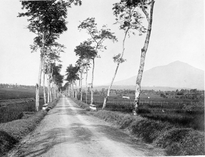 Foto. De tussen rijstvelden gelegen weg naar Tasikmalaja.